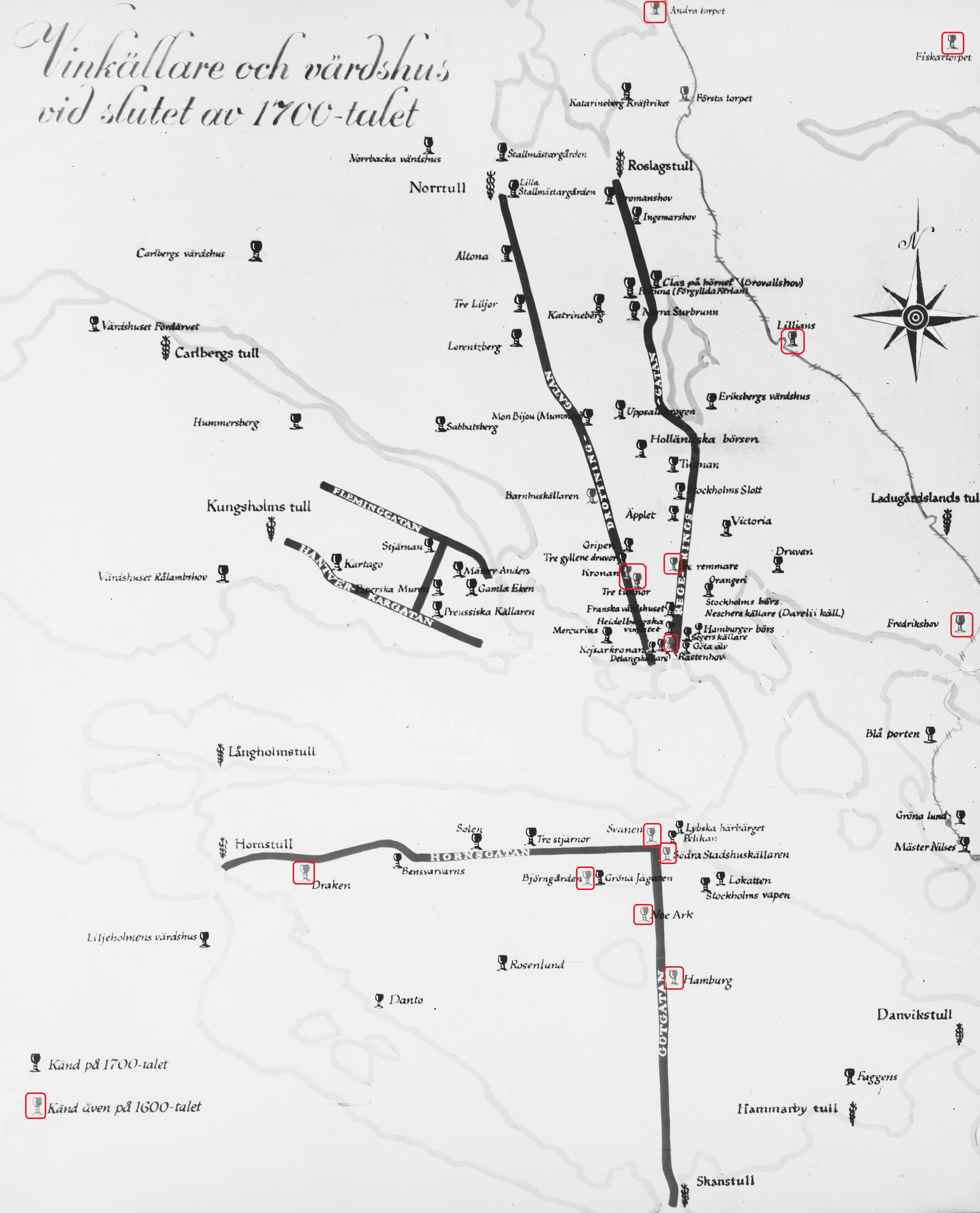 Kända Vinkällare på 1700-talet i Stockholm (exklusive Gamla stan)